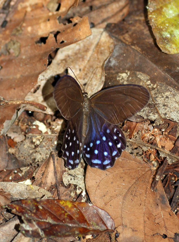 Peru. Iquitos area. Aug. 2008